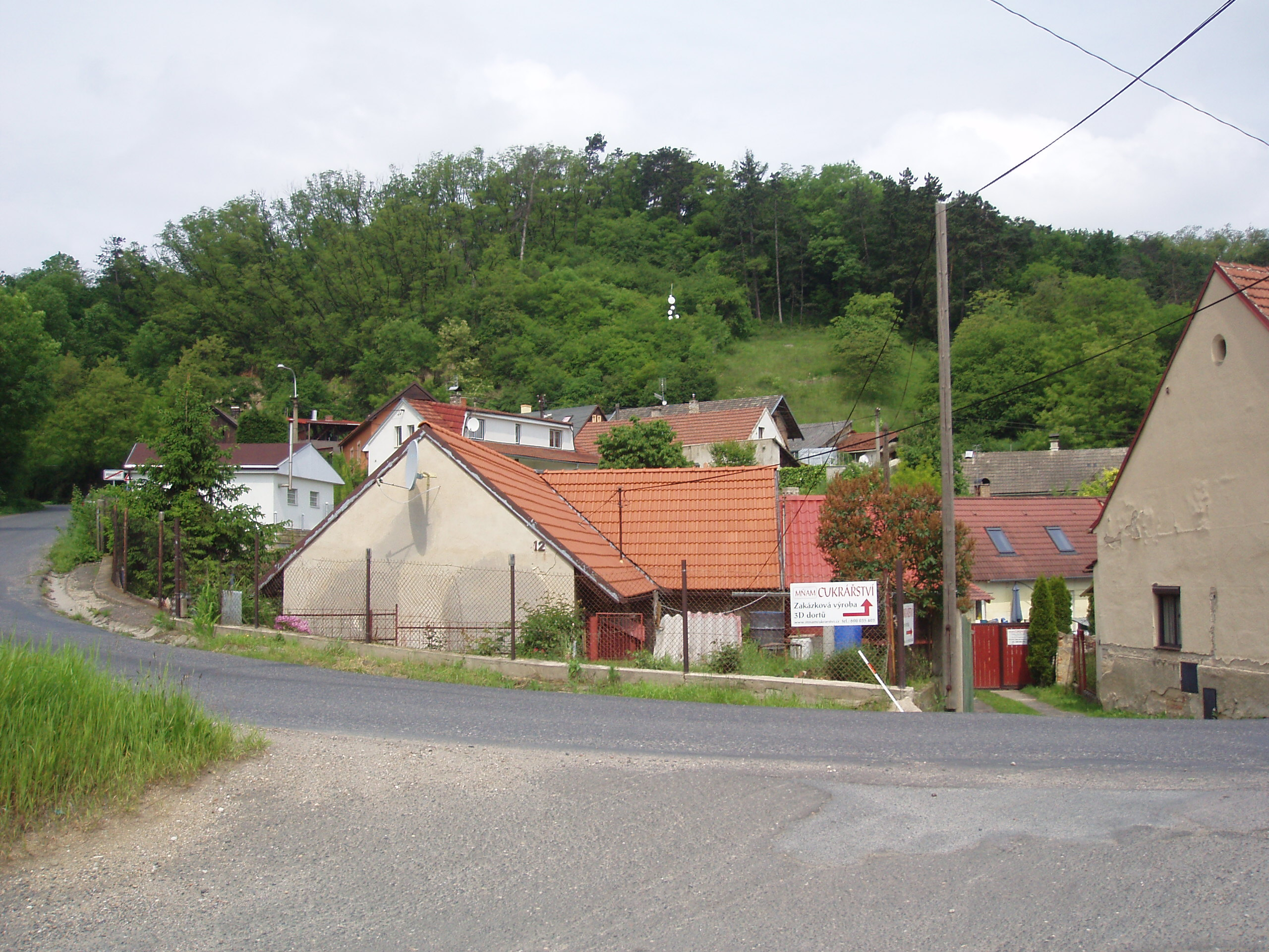 Hleďsebe 2 - část obce Nelahozeves v katastrálním území Podhořany.